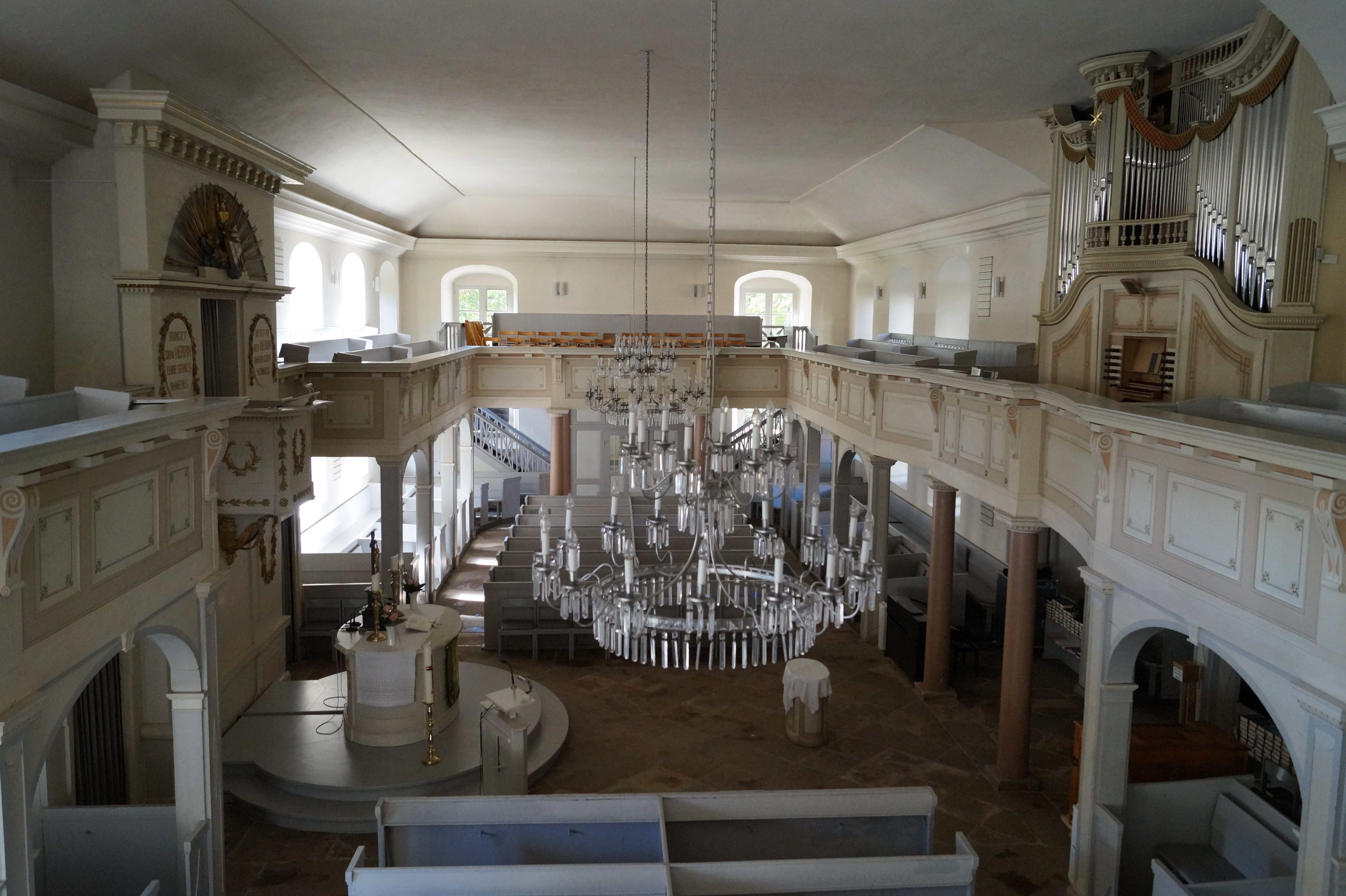 Kirche von der Westseite der Empore aus betrachtet